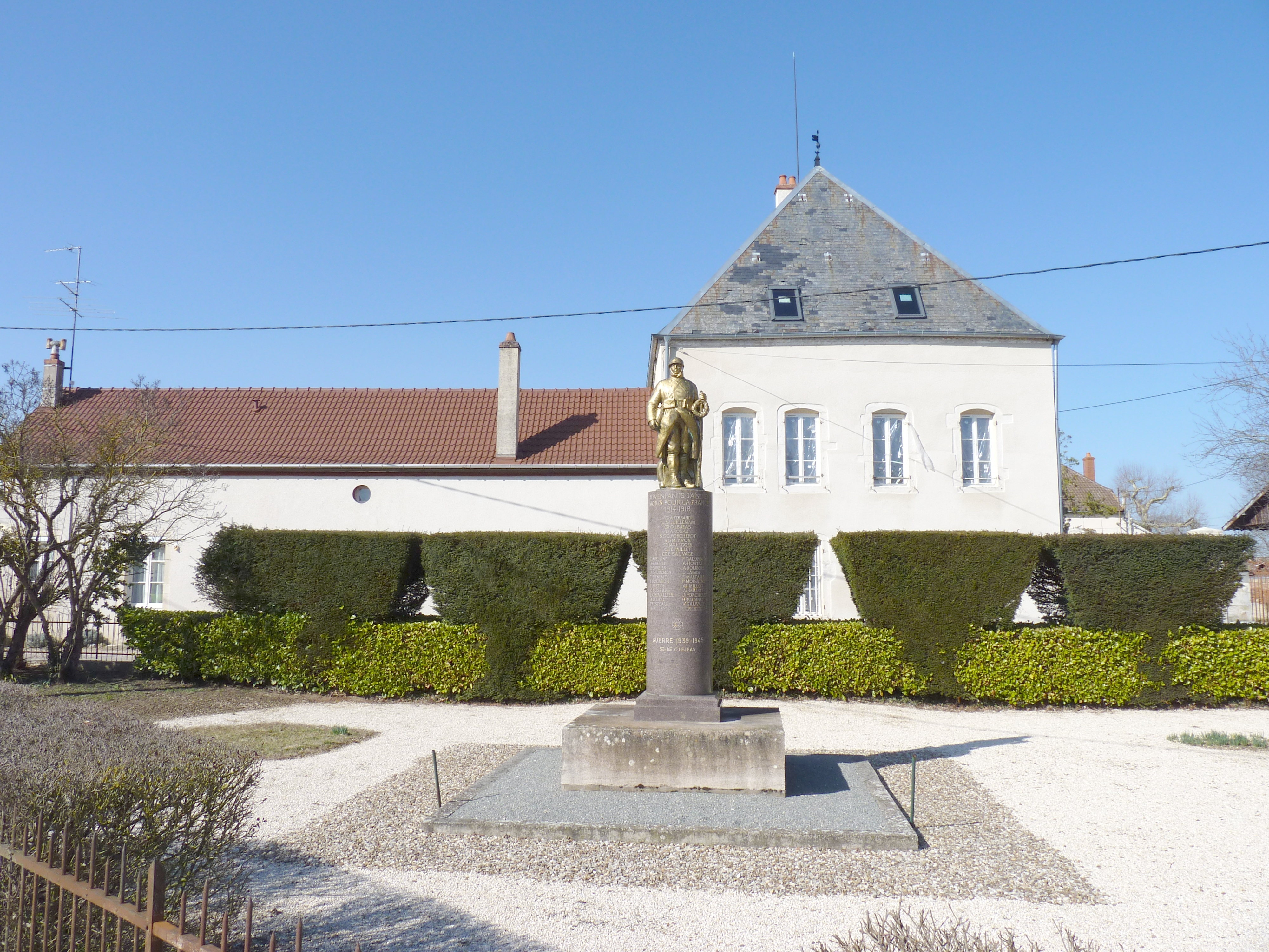 Monument aux morts, Aiserey (Côte d'Or, Bourgogne, France)